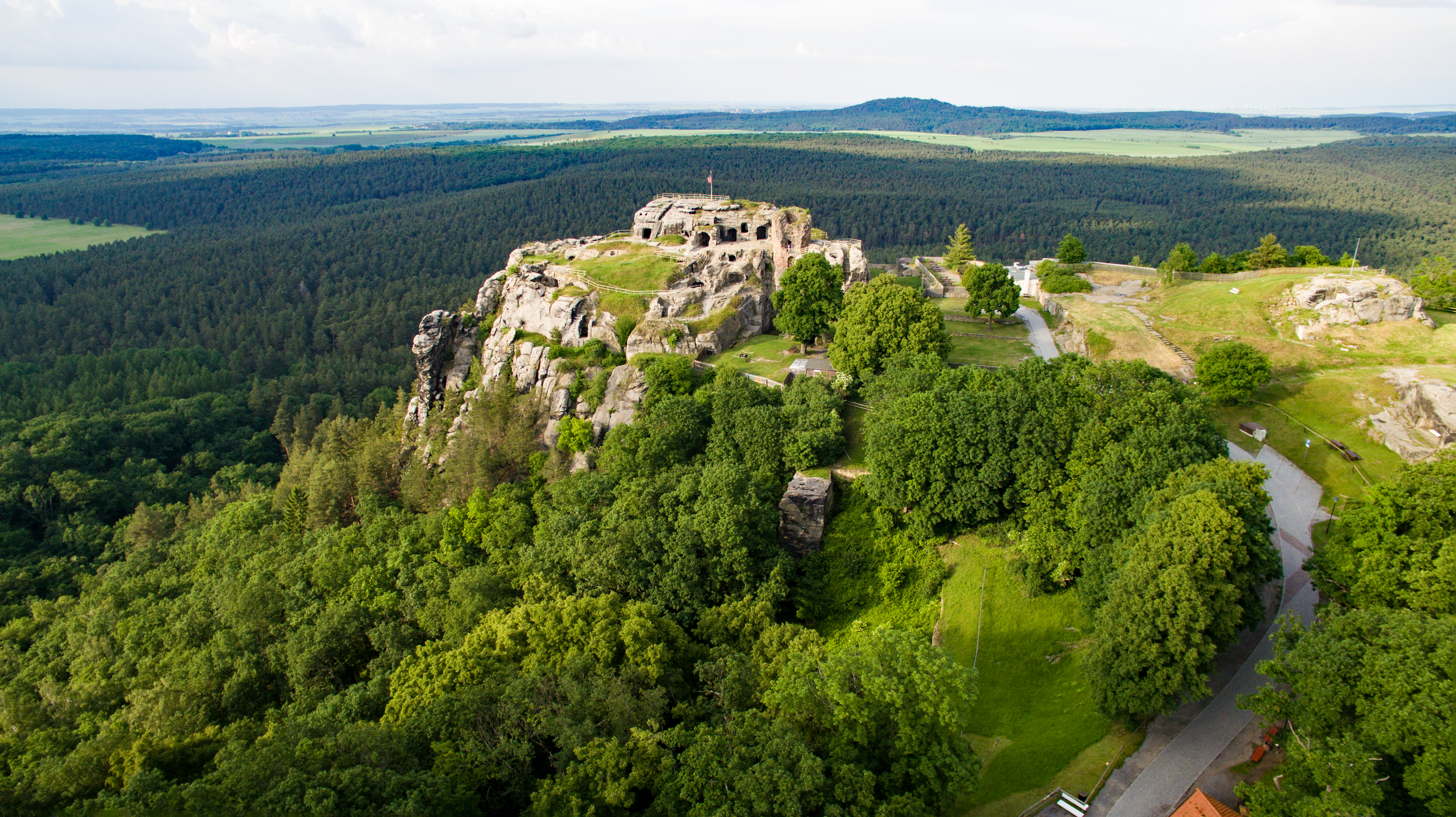 Burg Regenstein nahe Blankenburg (Harz)